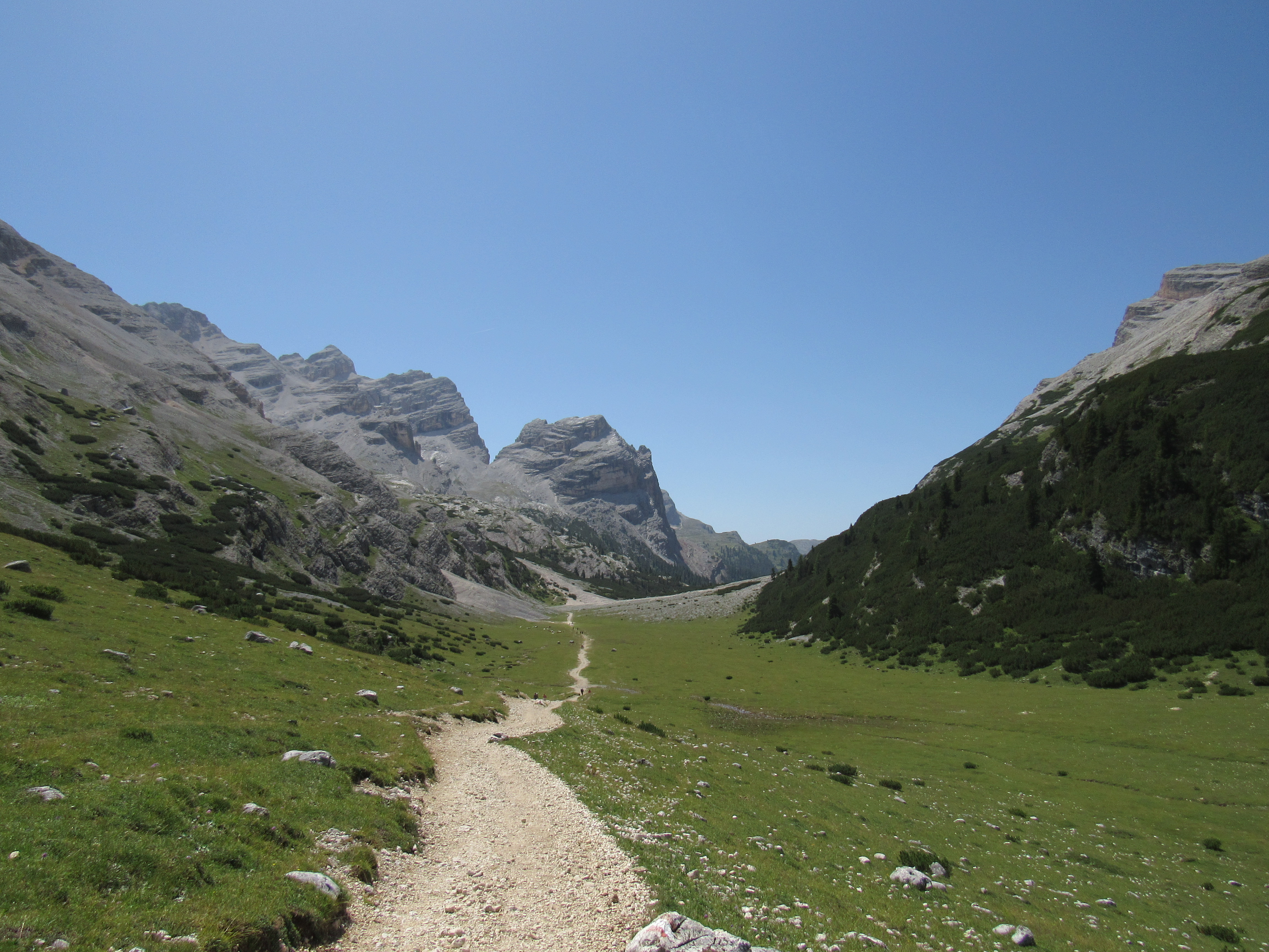 Parco naturale Fanes - Sennes - Braies (Q740279)